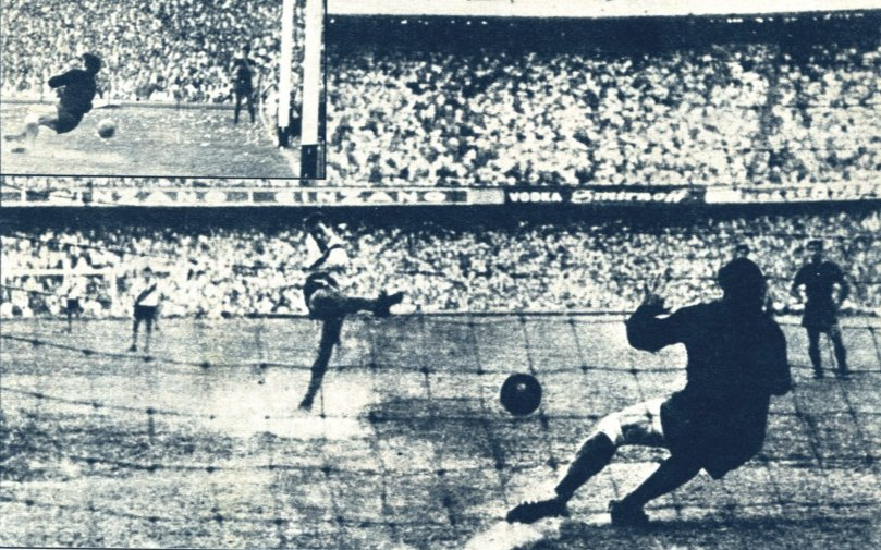 Famoso penal de Delem a Antonio Roma. Delem (River) patea penal. Roma (Boca) ataja. 9 de diciembre de 1962. Buenos Aires, Argentina.